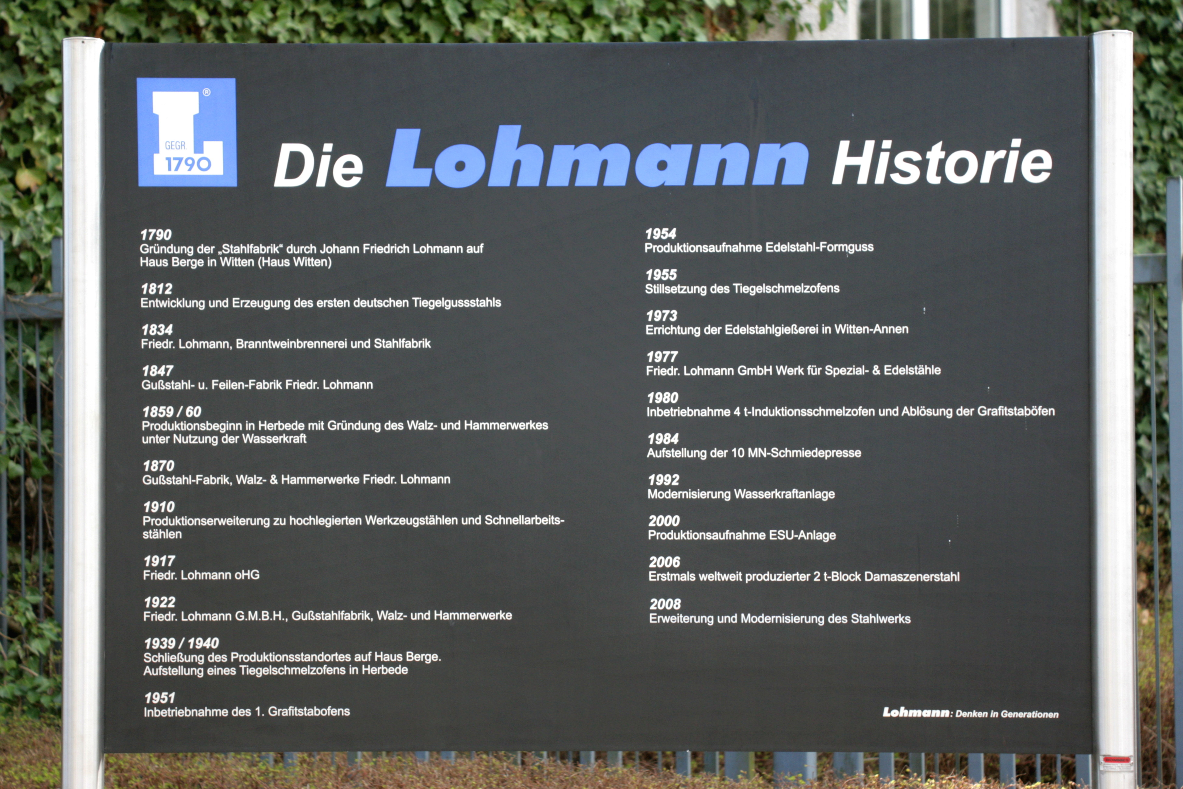 Friedr. Lohmann GmbH, Ruhrtal in Witten-Herbede